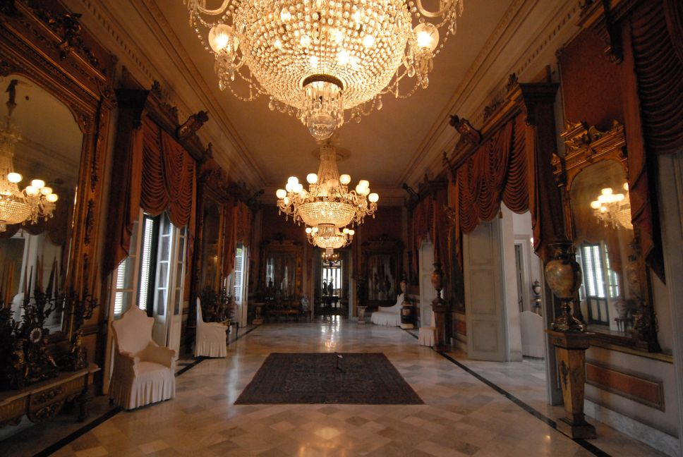 Cuba, augustus 2006, info in de Metadata